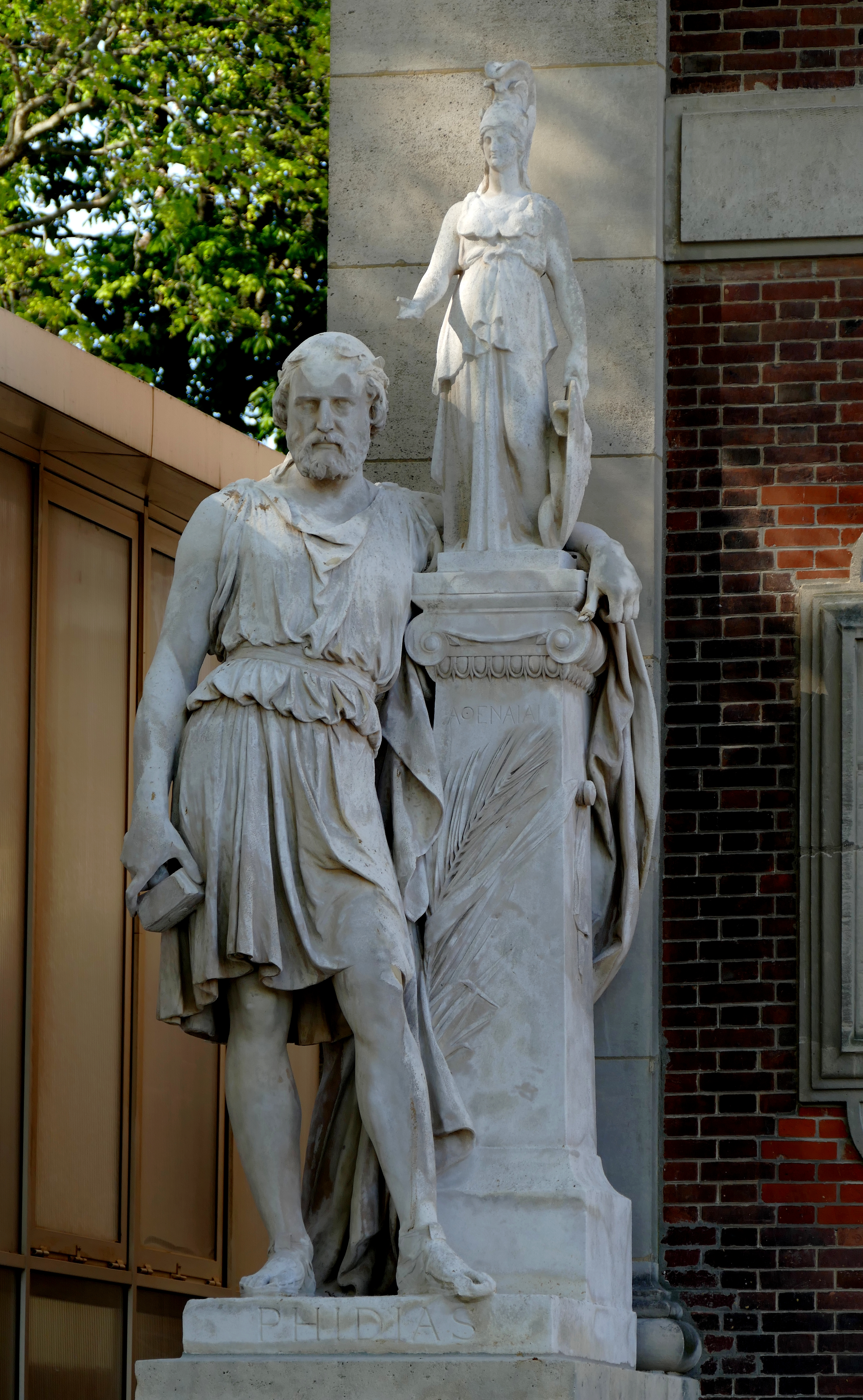 Statue de Phidias par Aimé Millet (1889). Hauteur environ 2,50 m. Orangerie du jardin du Luxembourg (à gauche de la porte, coté sud) - Paris (6éme arrond.). Signé et daté sur le socle.